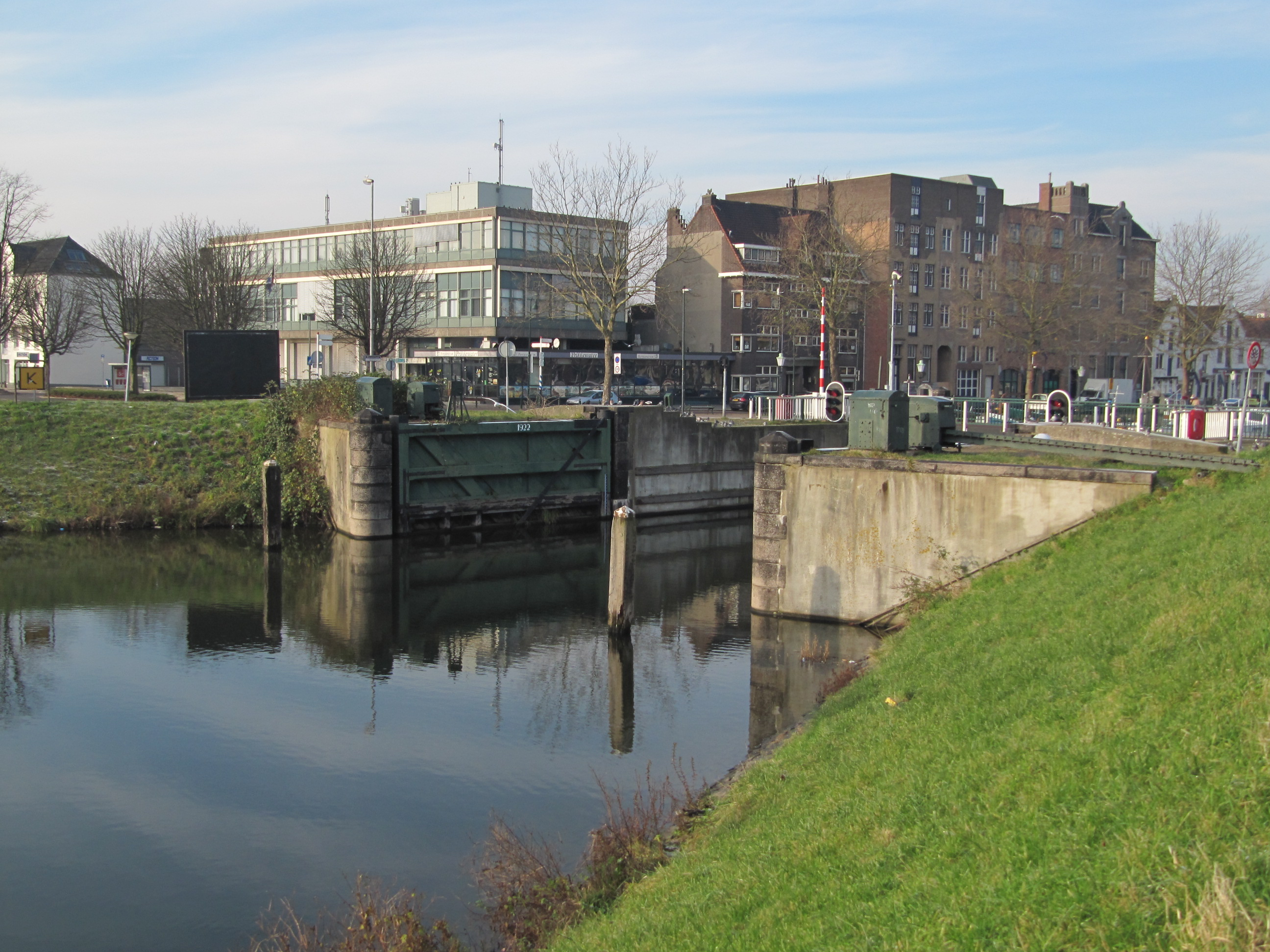 Delflandse Buitensluis Oosthavenkade